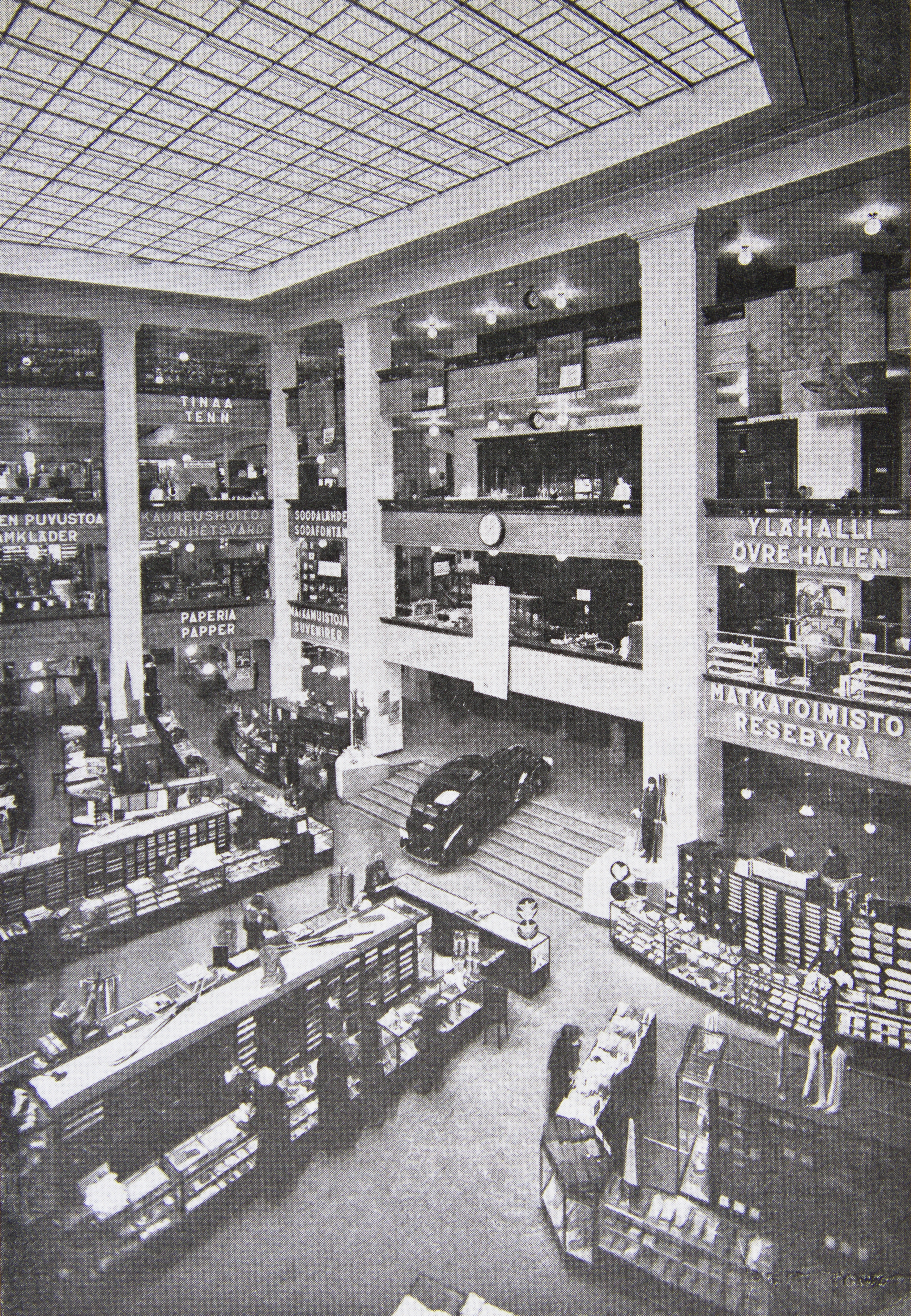 Stockmannin tavaratalon valopiha 1930-luvulla.